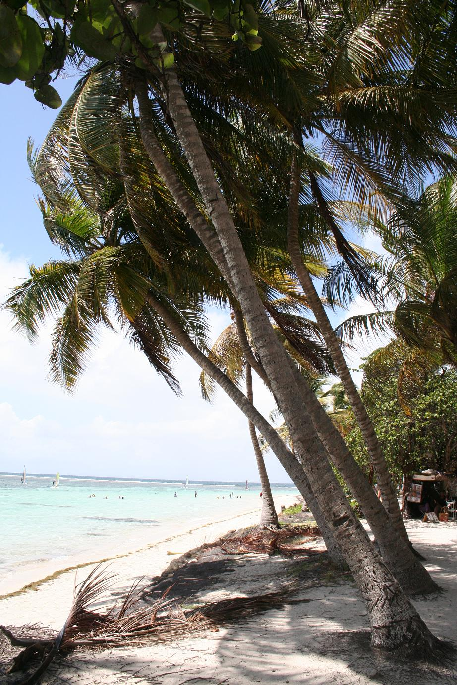 Photo personnelle, un matin à la plage de la Caravelle - 07 2006. Canon 350 D 18 mm, F 11, 1/400, iso 400